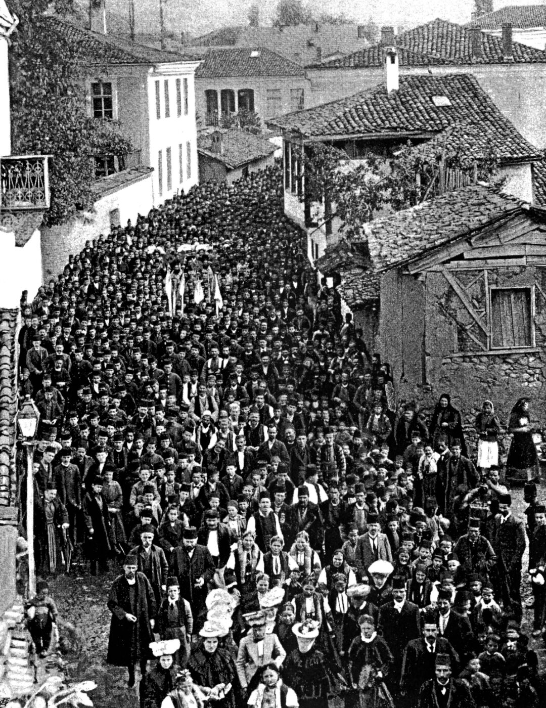 Religious procession, Bitola, 1902